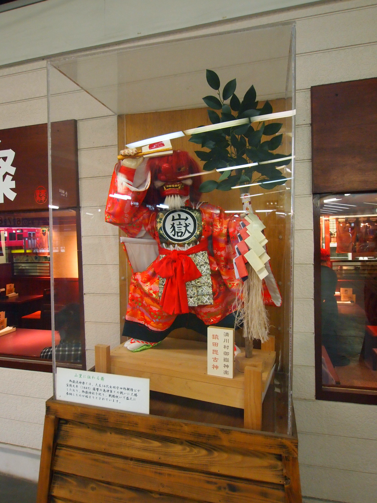 御嶽神楽像（大分県大分市大分駅）